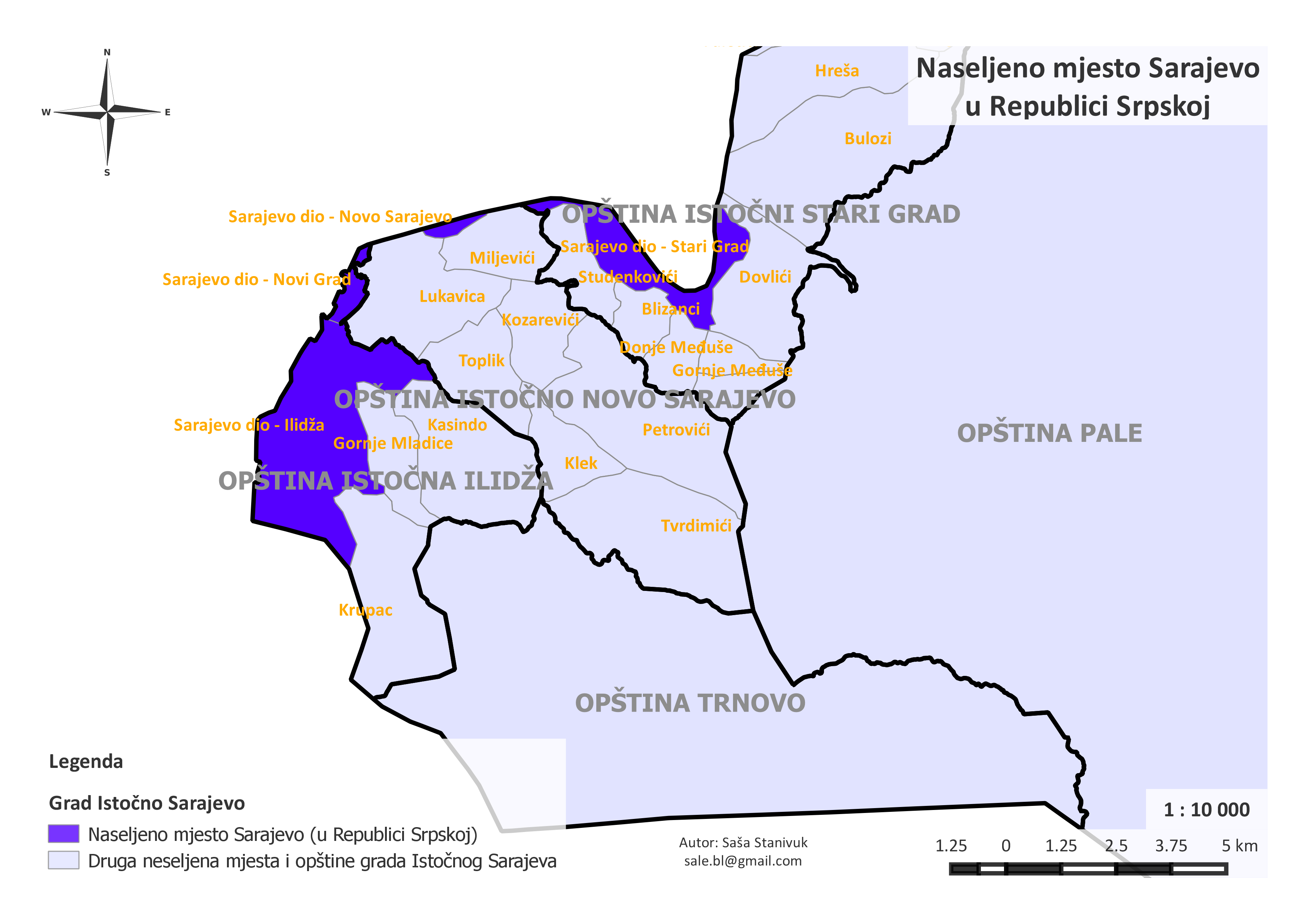 Насељено мјесто Сарајево у Републици Српској